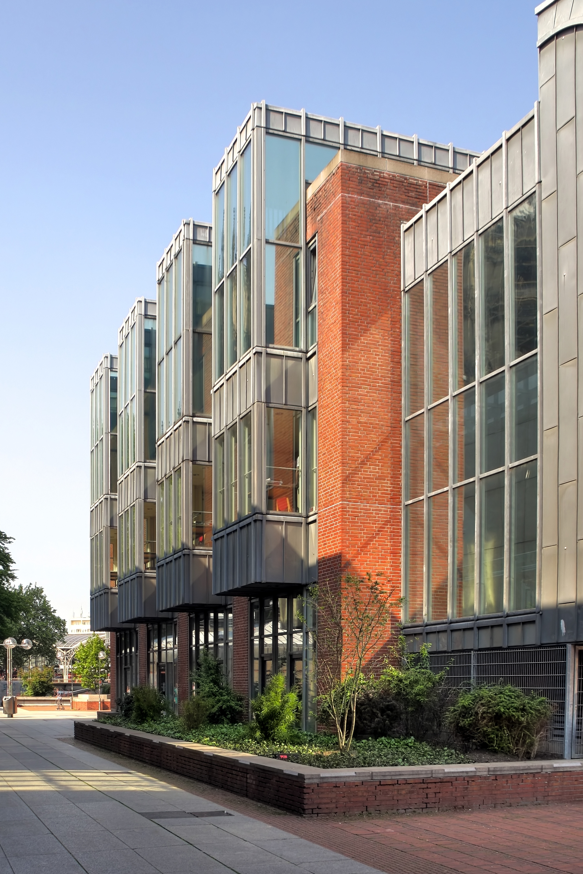 Kunst- und Museumsbibliothek der Stadt Köln. Ansicht von außen. Hinter den Fenstern in der 1. Etage befindet sich der Lesesaal.)